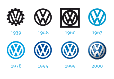 logos de volkswagen